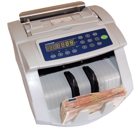 compteur de billets electronique